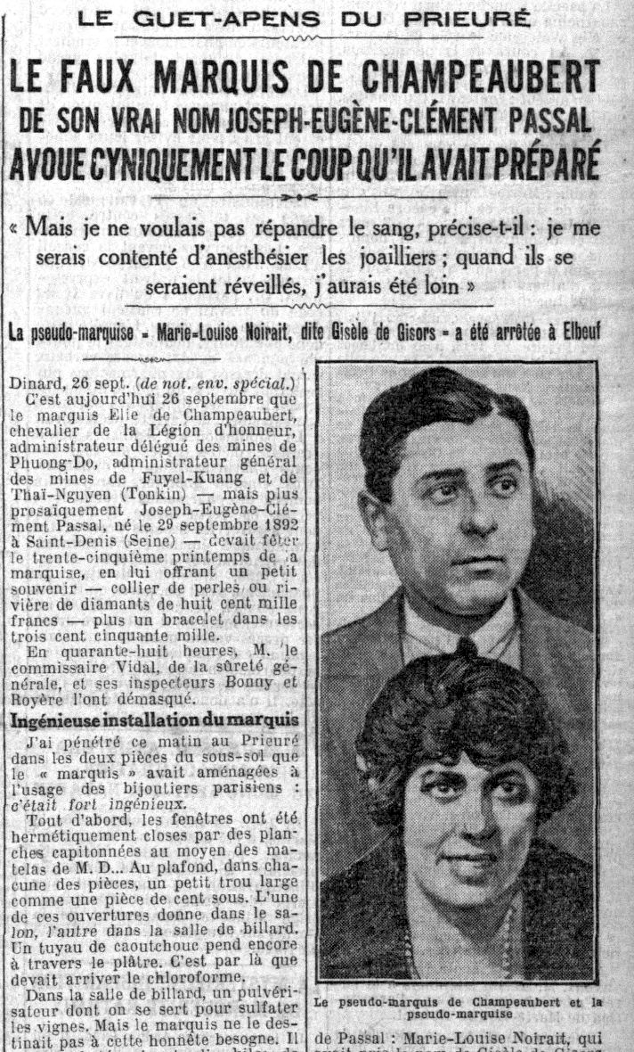 La Une du Petit Parisien annonce l'arrestation de l'escroc Clément Passal, dit le marquis Elie de Champaubert et mentionnant le rôle de Pierre Bonny dans celle-ci